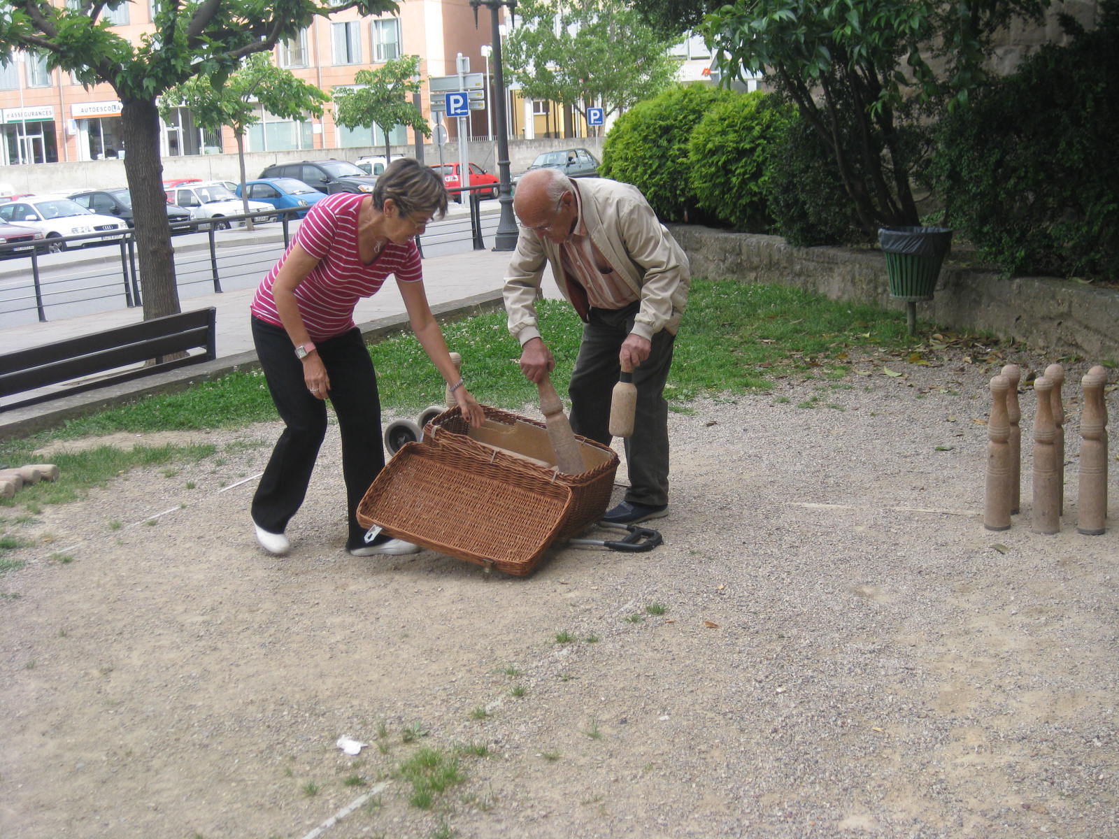 Joc Popular. El Club de Jubilats l'Estel, jugant a bitlles a Solsona.